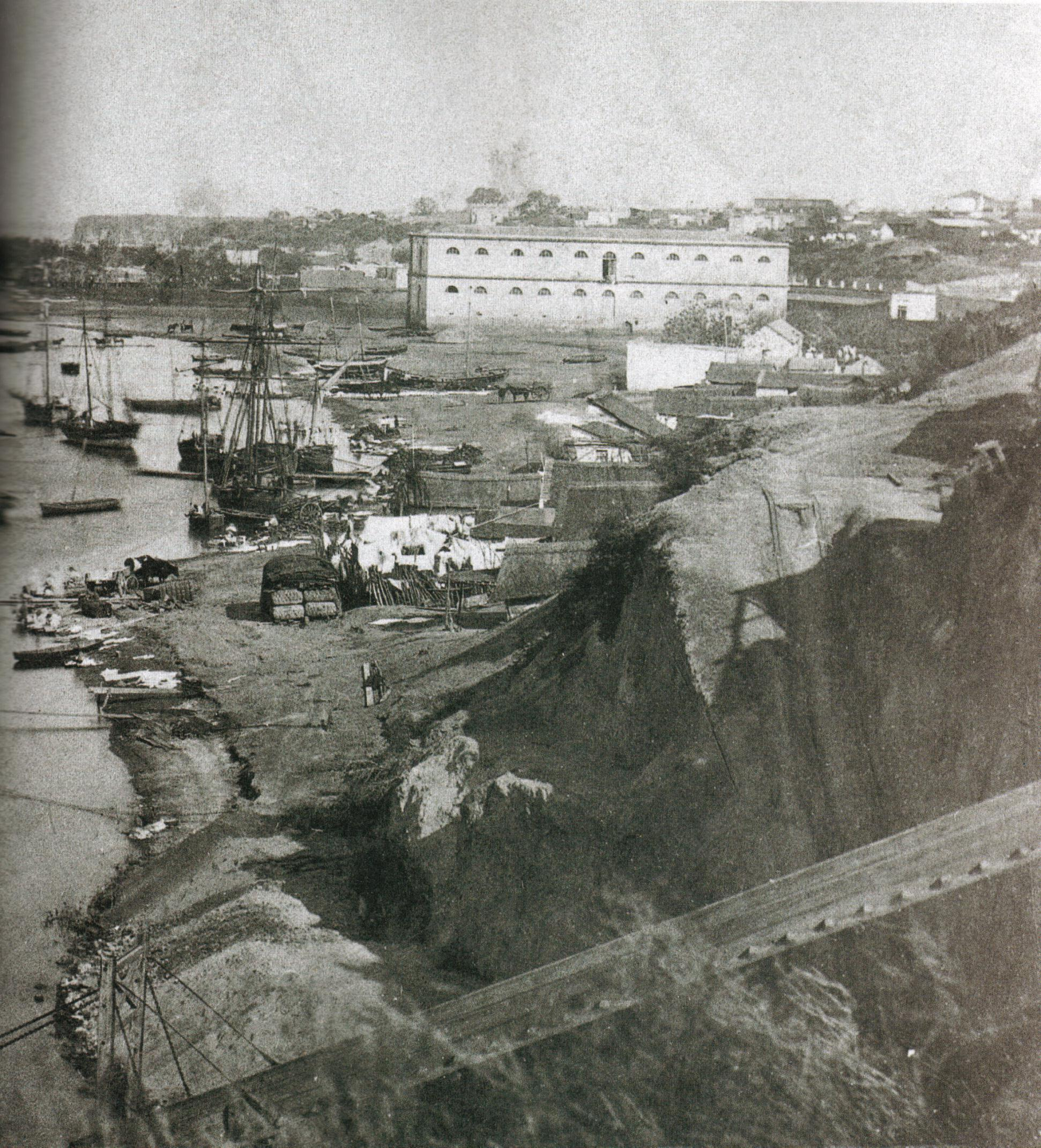 El puerto de Rosario, a mediados del siglo XIX